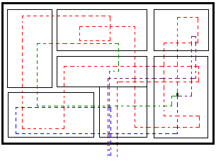 Diagram_spaghetti_kilka_surowcow